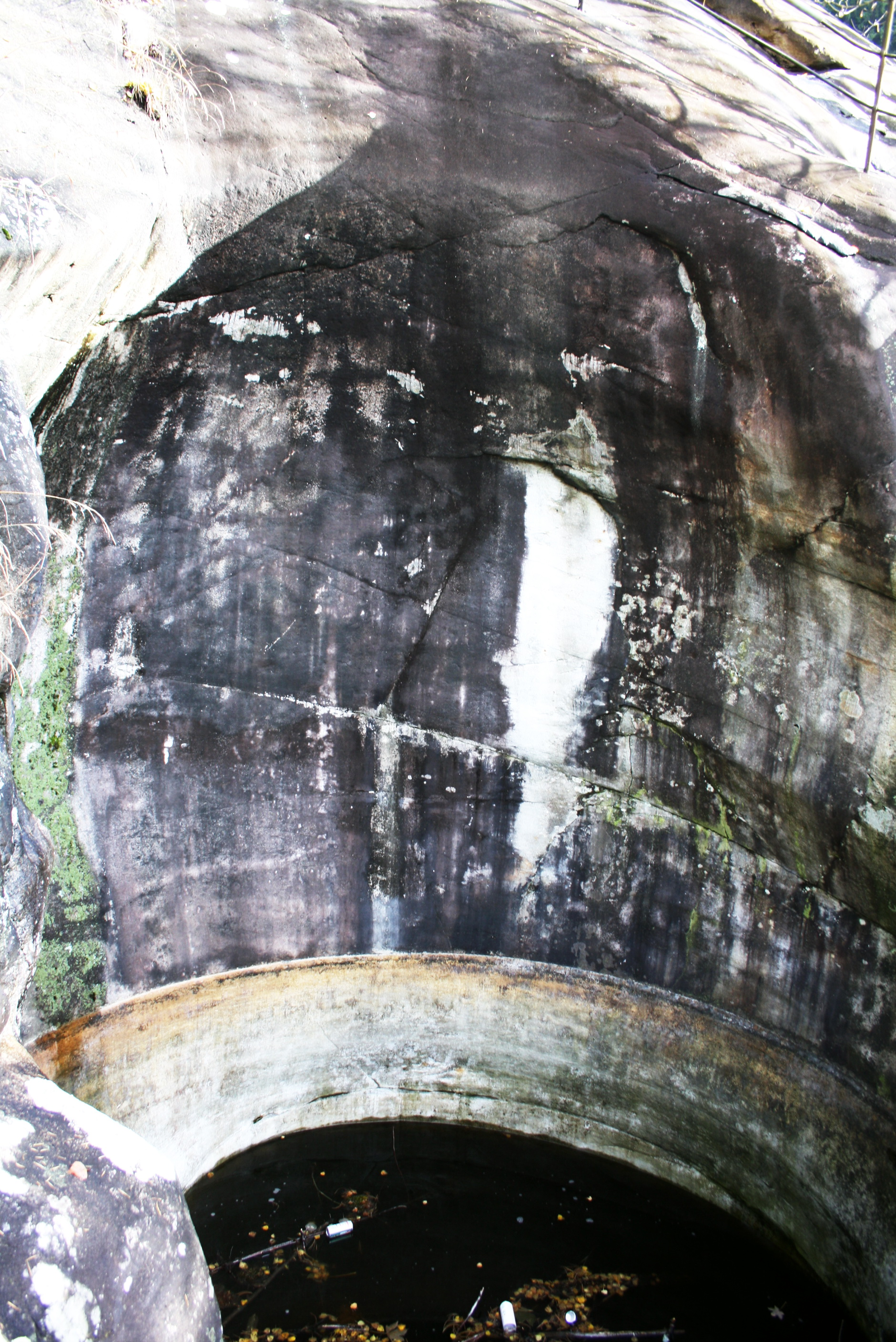 Gelteschertopf in Bad Gastein im Zentrum des Ortes. This media shows the natural monument in Salzburg with the ID NDM00001.